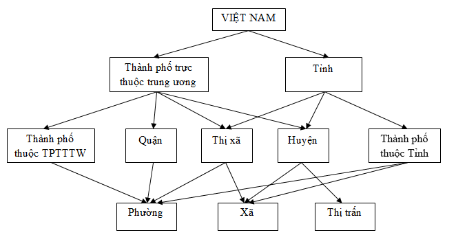 Phân cấp hành chính Việt Nam theo Luật tổ chức chính quyền địa phương 2015 và Hiến pháp 2013